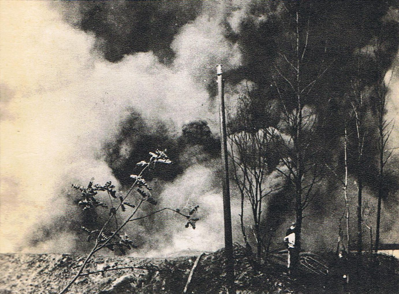 Zdjęcia z pożaru Rafinerii Czechowice Dziedzice w czerwcu 1971 r.